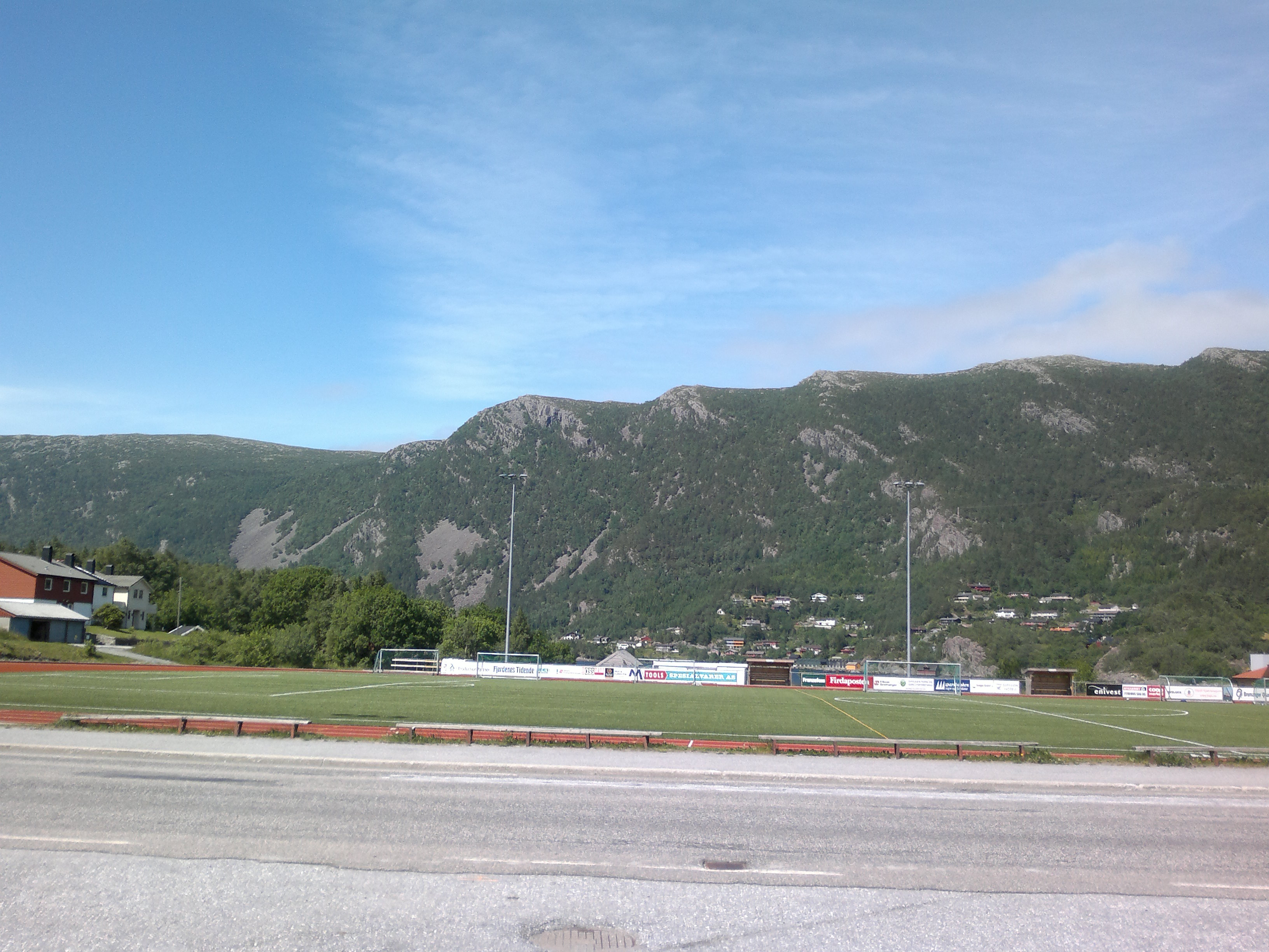 Svelgen Stadion Svelgenin kylässä, Norjassa